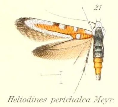 Heliodines perichalca